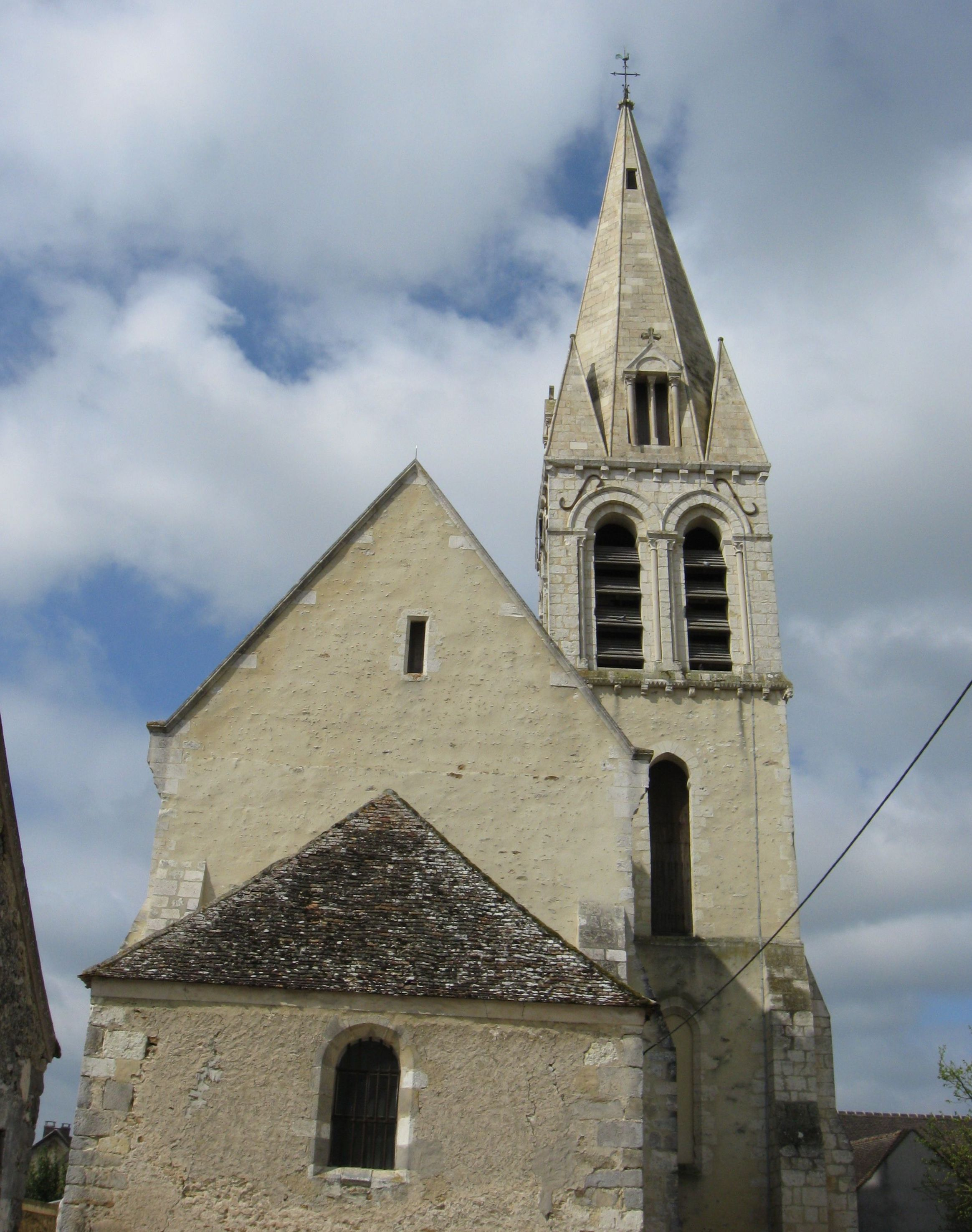 Église Saint-Martin de Moisenay. ( Seine-et-Marne, région Île-de-France).